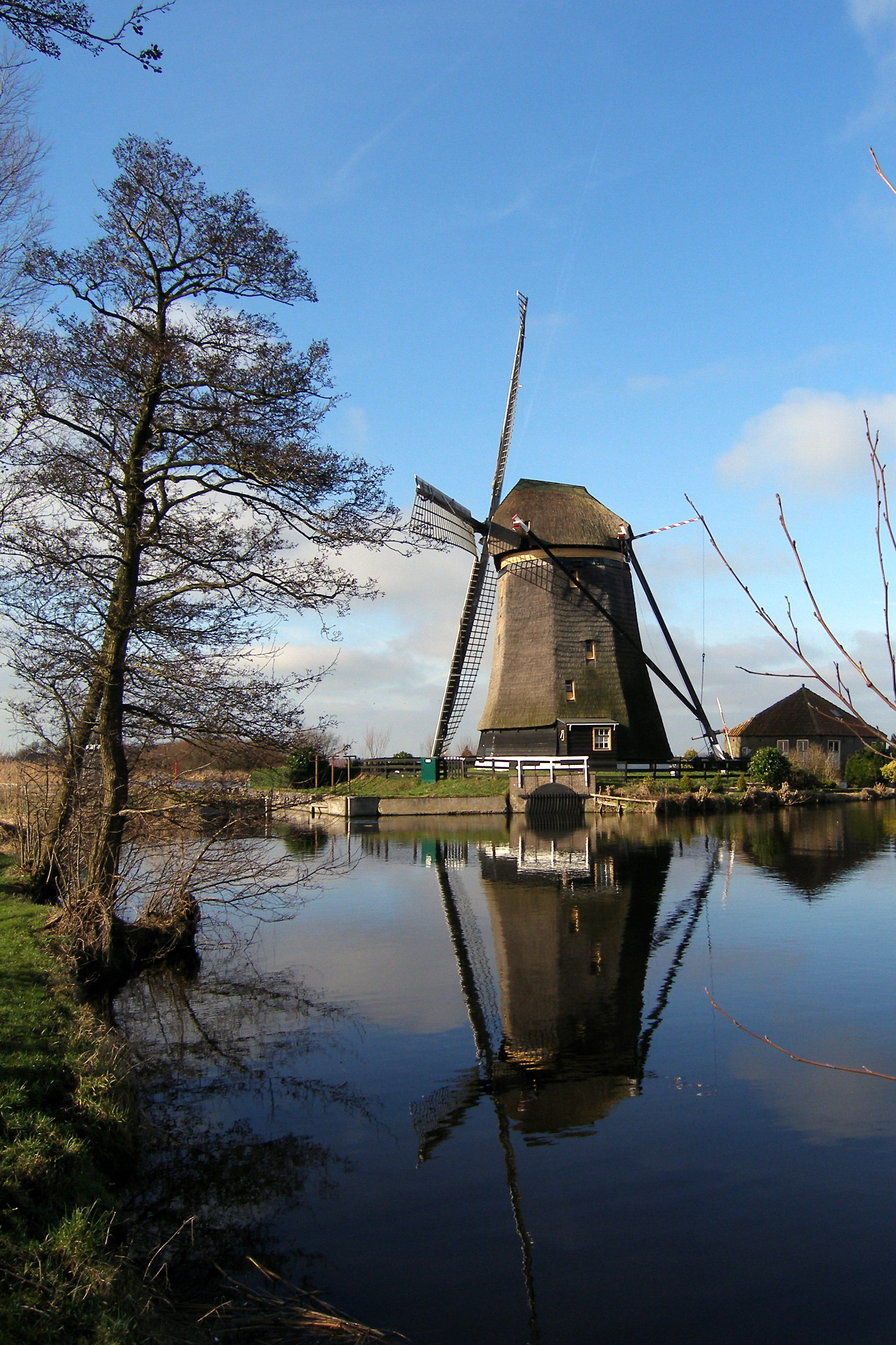 Dutch windmill De Rietveldse Molen, in Rijnwoude. It was built circa 1648 to drain the Rietveldse polder.